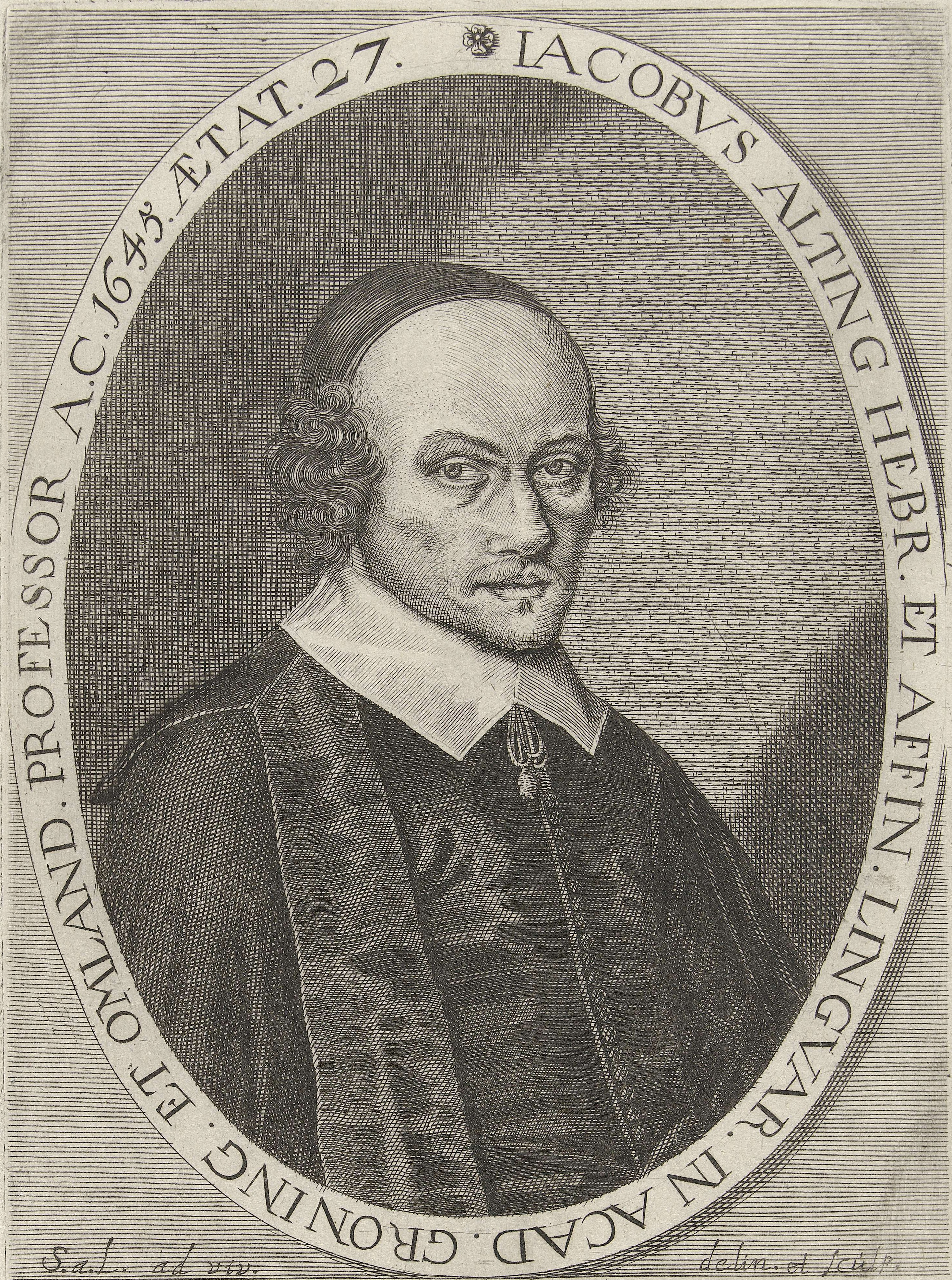 Gravure van Jacob Alting van graveur Steven van Lamsweerde (1620-ca. 1686)